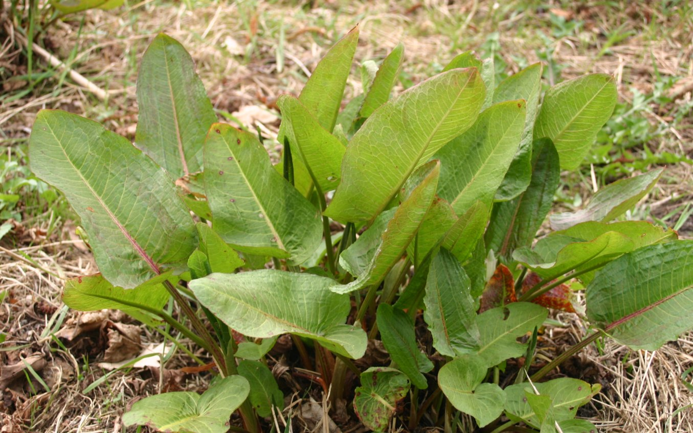 Rumex obtusifolius: Foliage